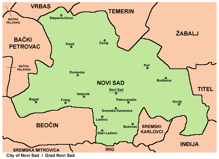 Map of Novi Sad City administrative area. Mapa administrativnog područja Grada Novog Sada.